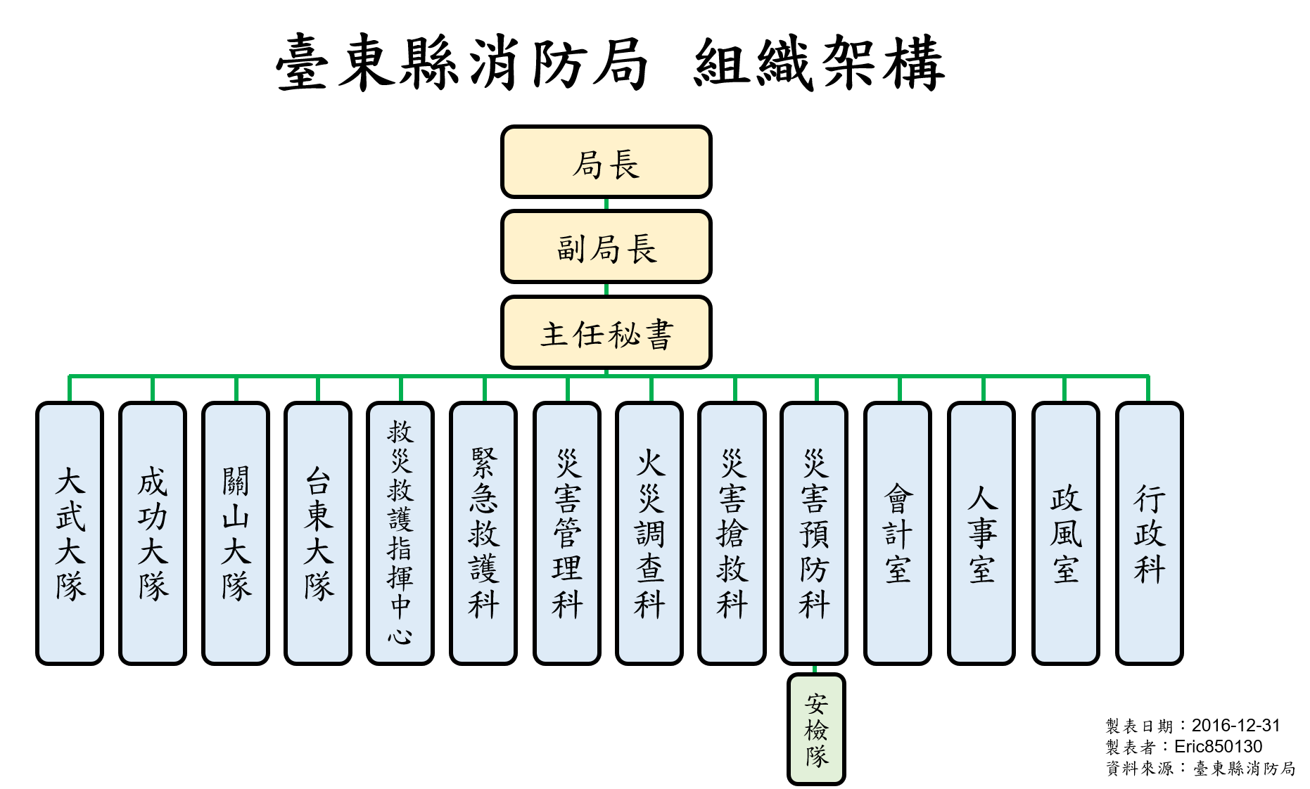 臺東縣消防局組織架構